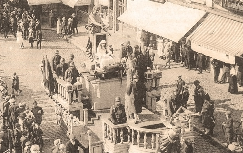 Carte postale de 1919 : ce char n'a été aménagé ainsi qu'une seule fois. La seule information sur cette photo est sa date. Photographe inconnu. Cette pjot, conservée notamment aux Archives de la Ville d'Ath a été publiée dans plusieurs articles ou ouvrages consacrés à la Ducasse d'Ath.